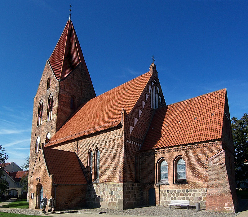 Kirche in Rerik, Mecklenburg-Vorpommern